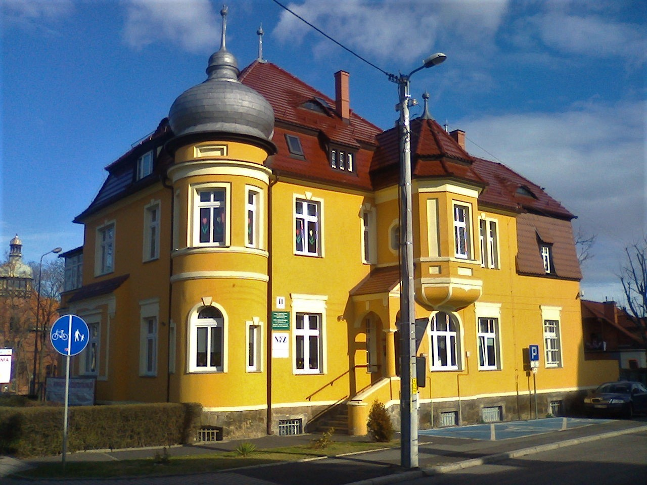 Dzierżoniów, ul. Świdnicka